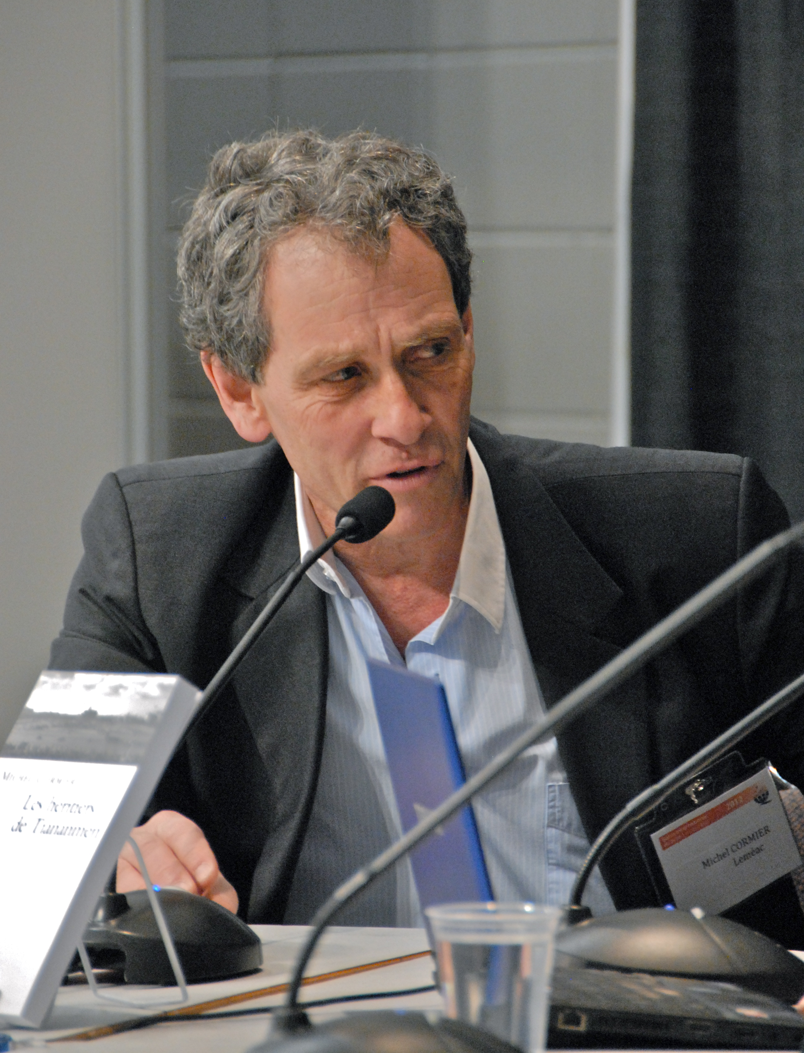 Michel Cormier, lors du Salon international du livre de Québec 2012